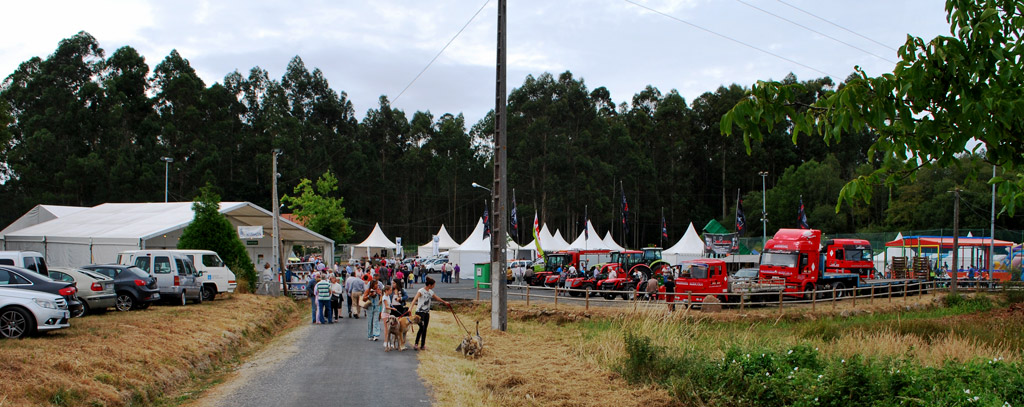 Festa do viño Branco Lexítimo en Paderne, en 2015